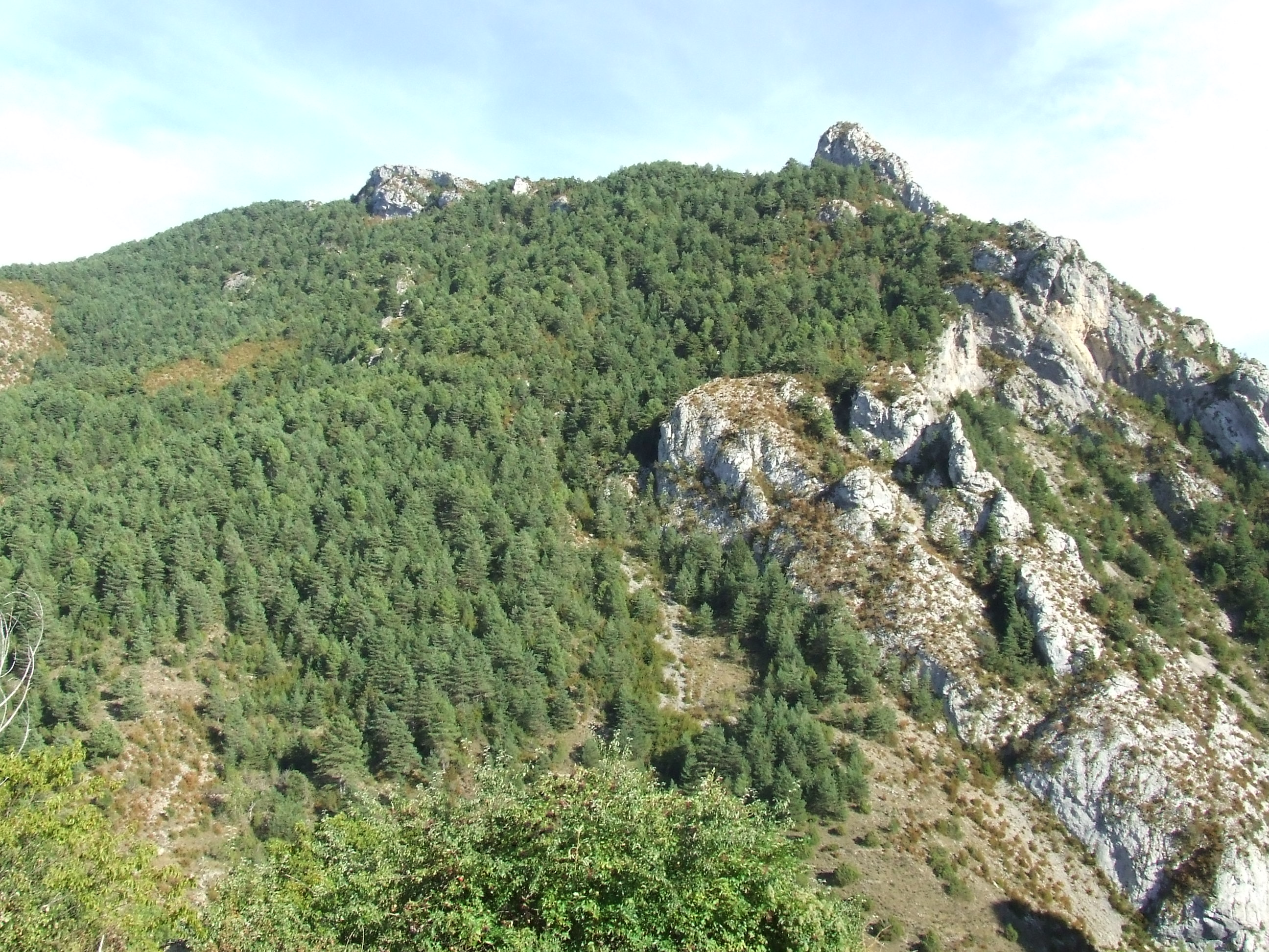 Lo Picalt i la Roca Alta (Bóixols, Abella de la Conca, Pallars Jussà)